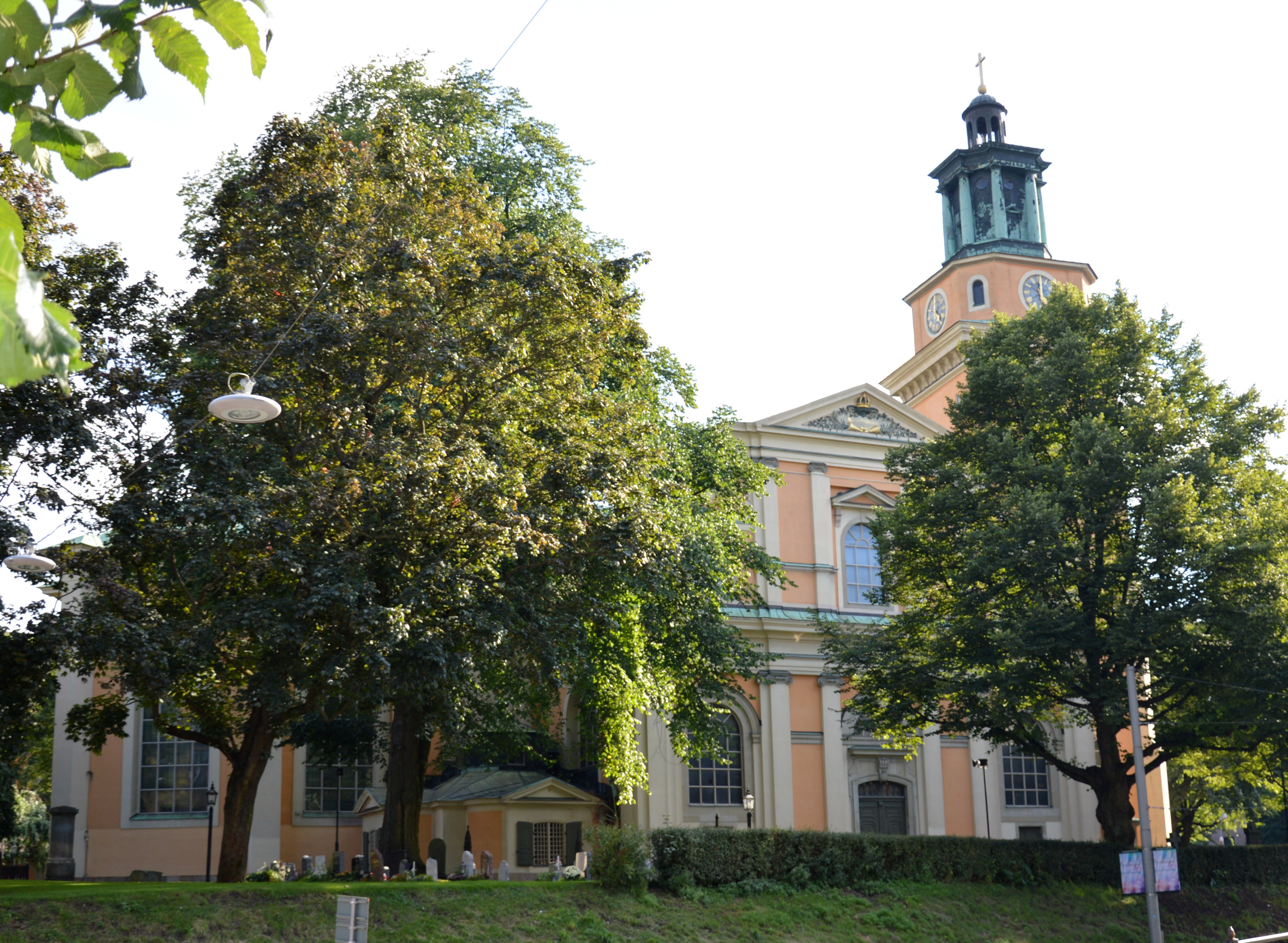 Sankt Maria Magdalena Kirche